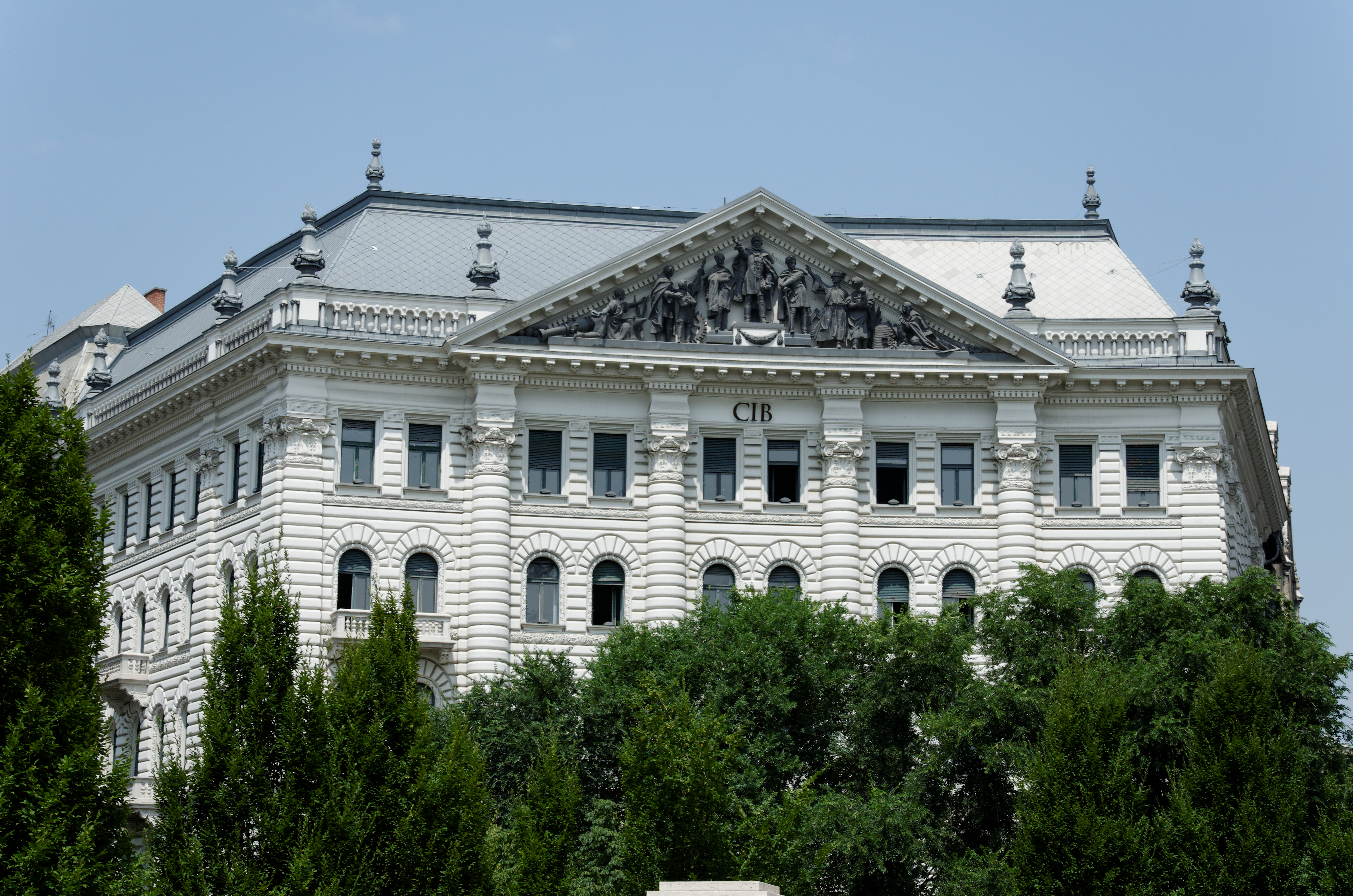 Banque CIB, Place de la Liberté (Szabadság Square), 5e arrondissement de Budapest